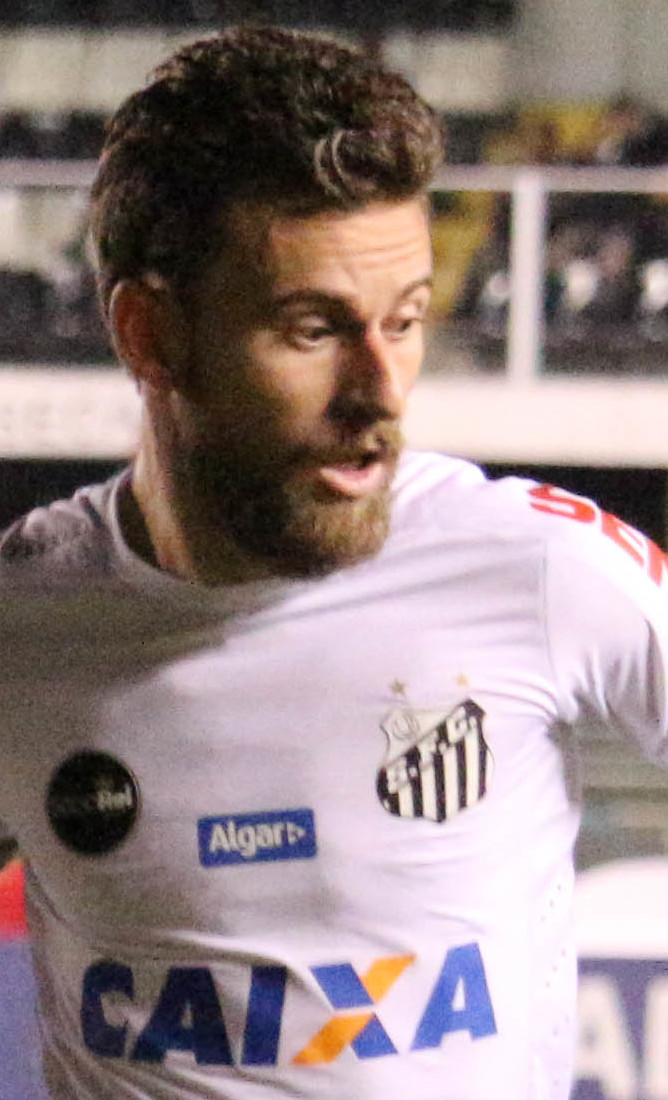 Foto: Douglas Teixeira/Futebol Santista